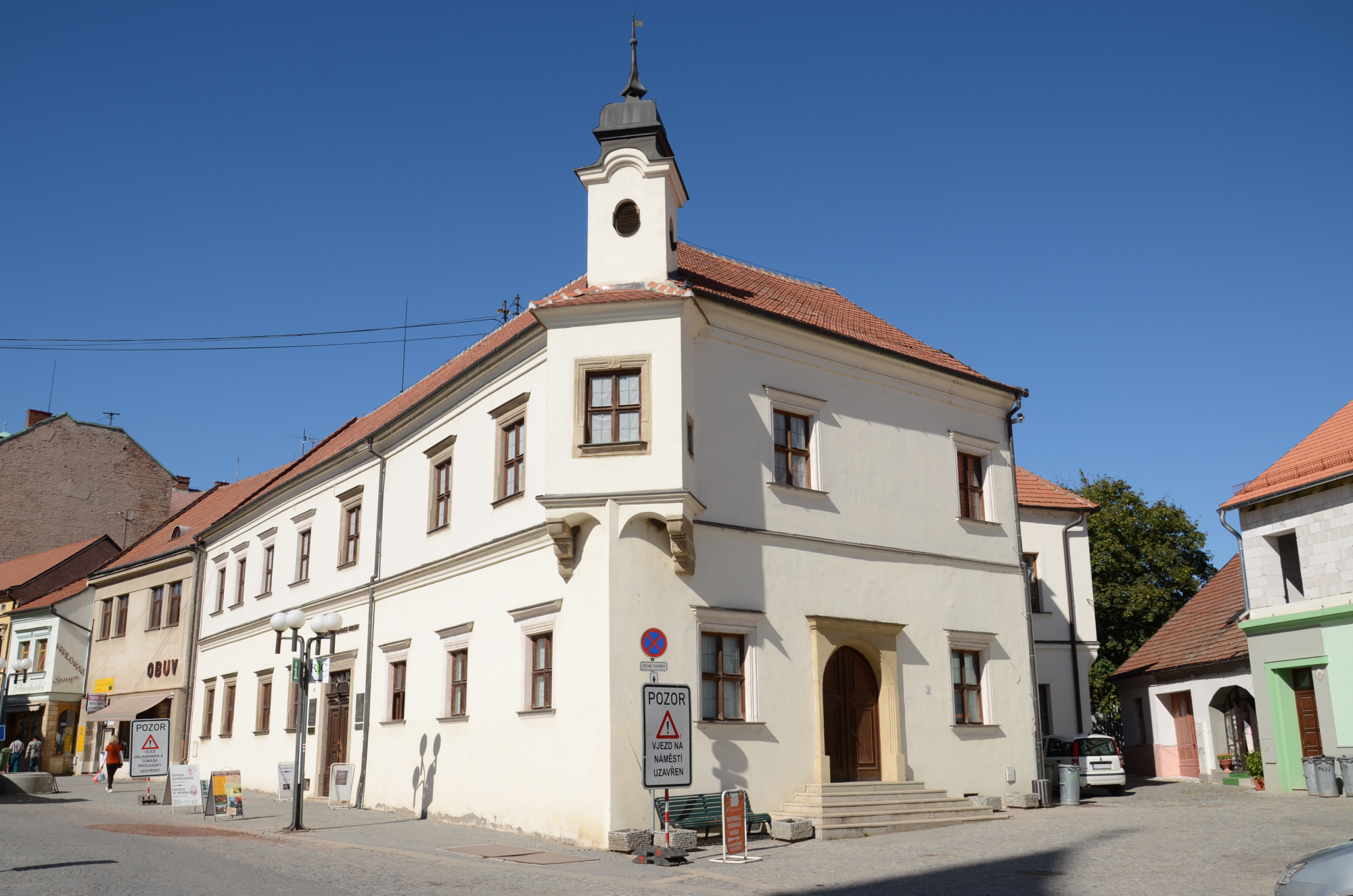 radnice (Ivančice), nám. Palackého 4/9, Ivančice